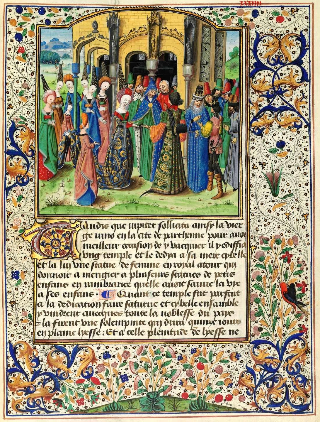 Mariage de Jupiter avec sa soeur Junon devant le temple de Cybèle. Raoul Lefèvre, Recueil des histoires de Troie. Le Maître de la Chronique d’Angleterre, enlumineur, Bruges, vers 1470-1480.